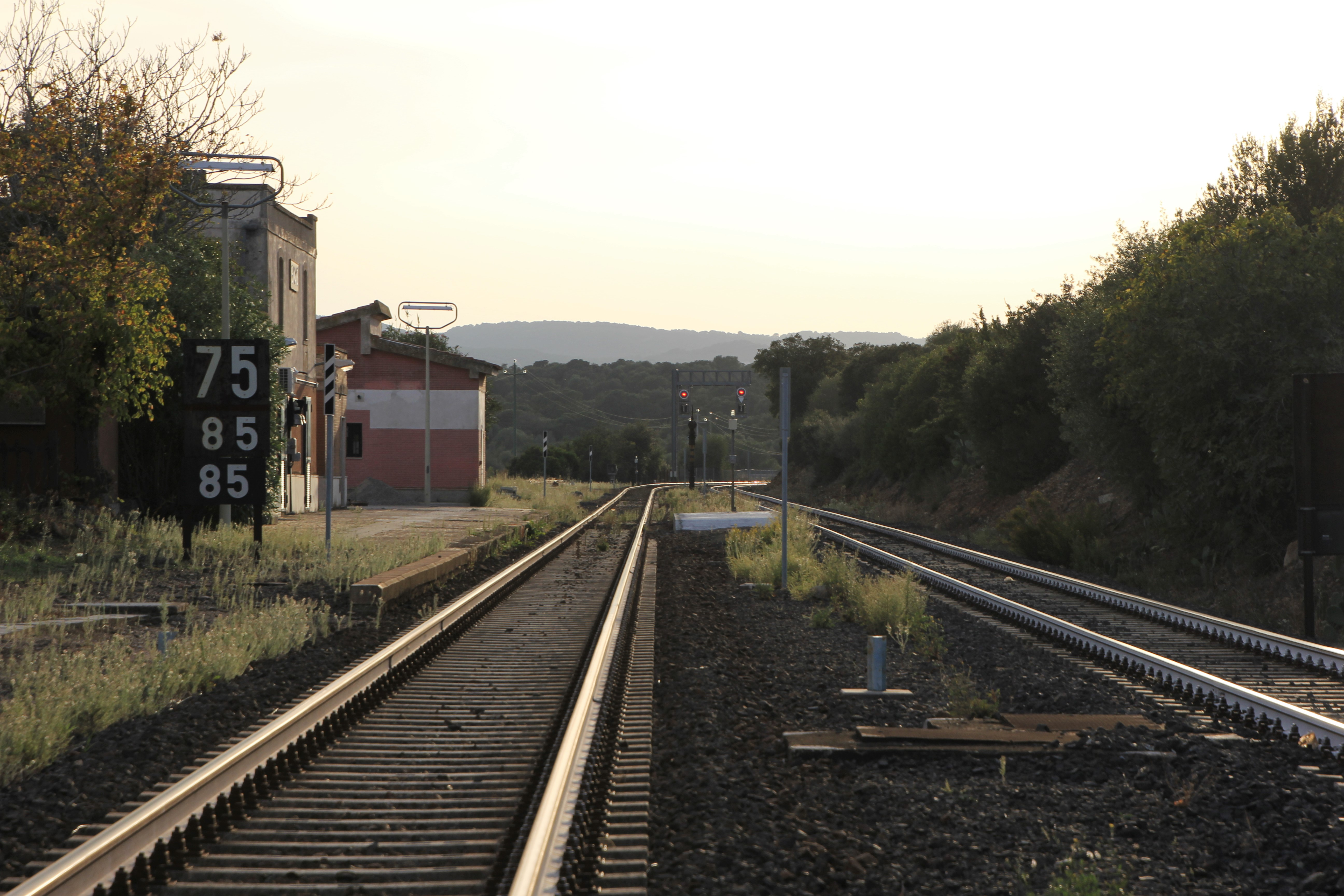 Olbia, stazione ferroviaria di Enas